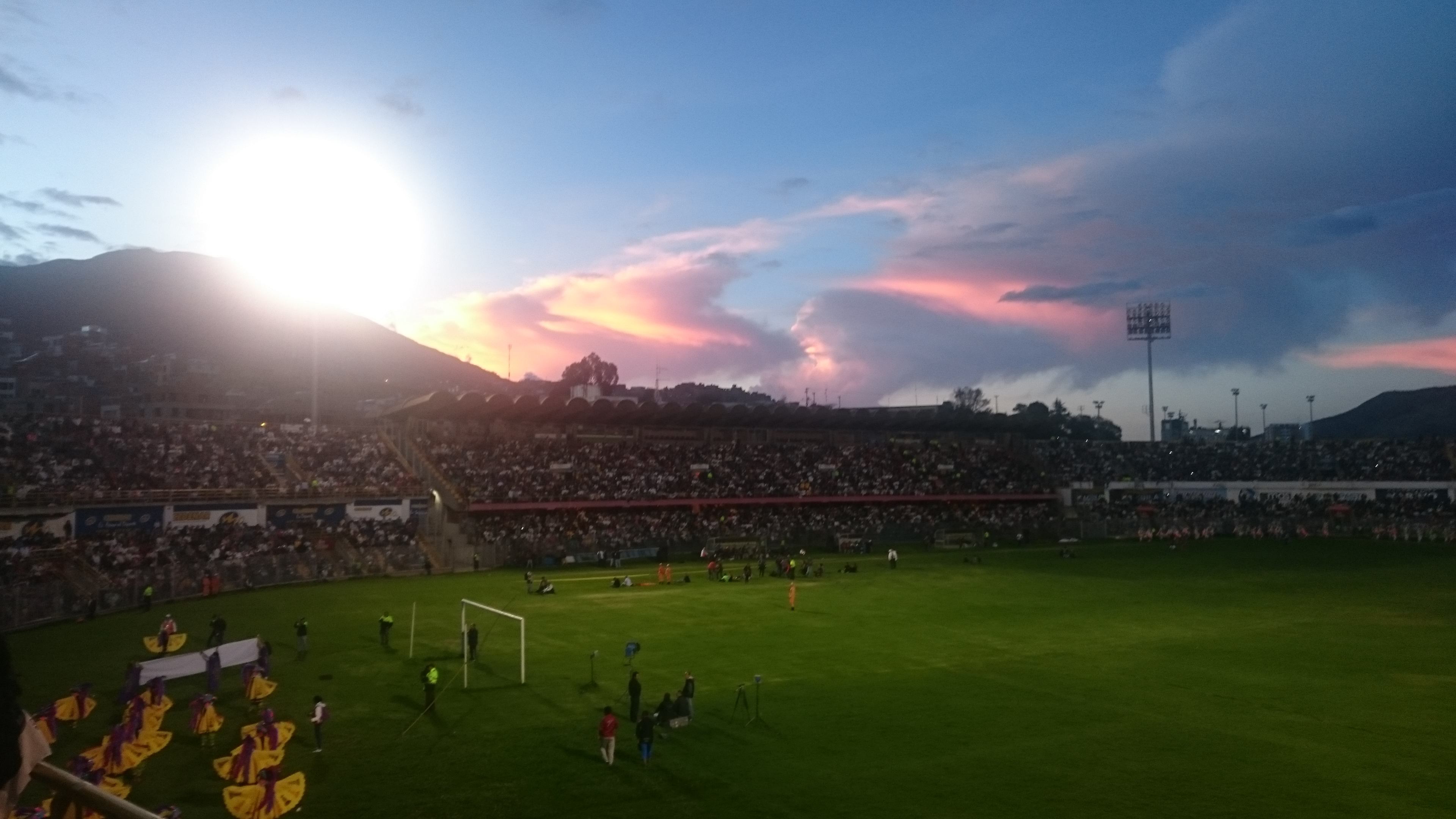 Esta fotografía fue tomada en el municipio colombiano con código 52001.